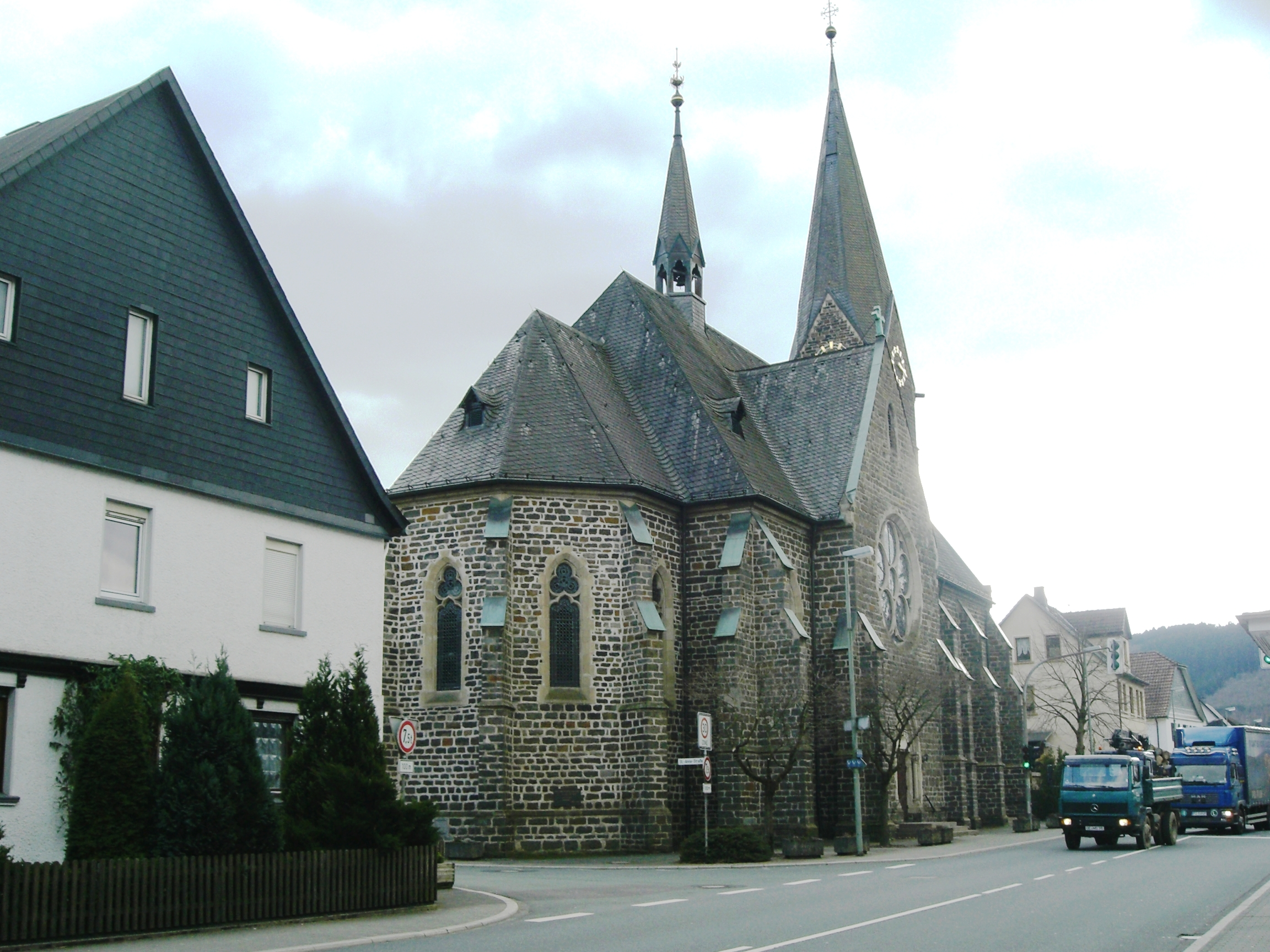 Katholische Kirche St, Anna